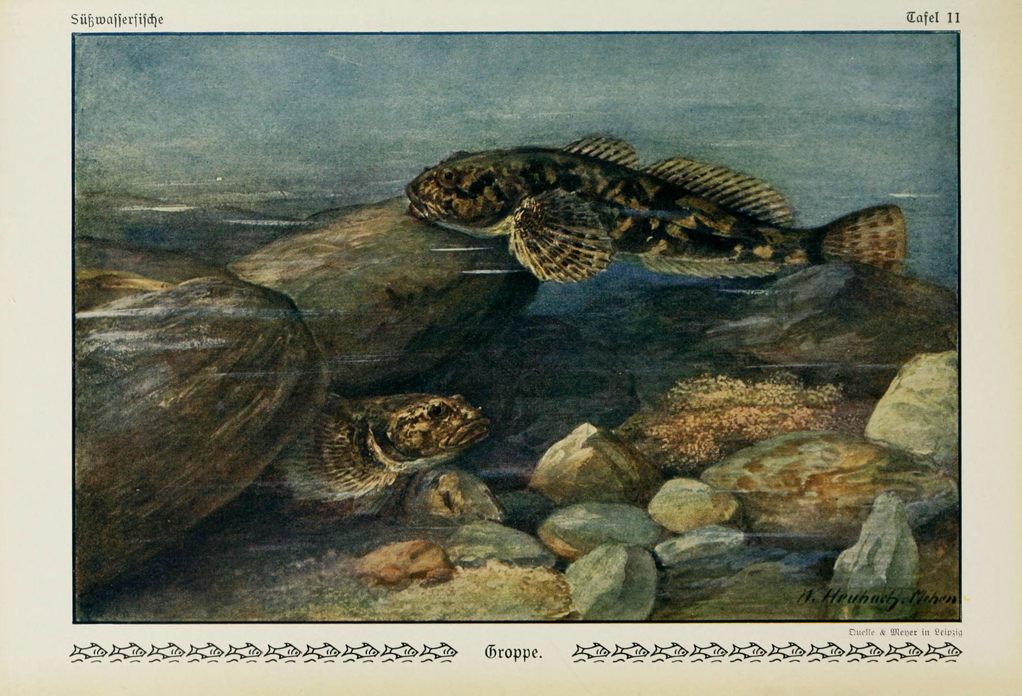 Unsere Süßwasserfische : eine Übersicht über die heimische Fischfauna nach vorwiegend biologischen und fischereiwirtschaftlichen Gesichtspunkten / von Emil Walter